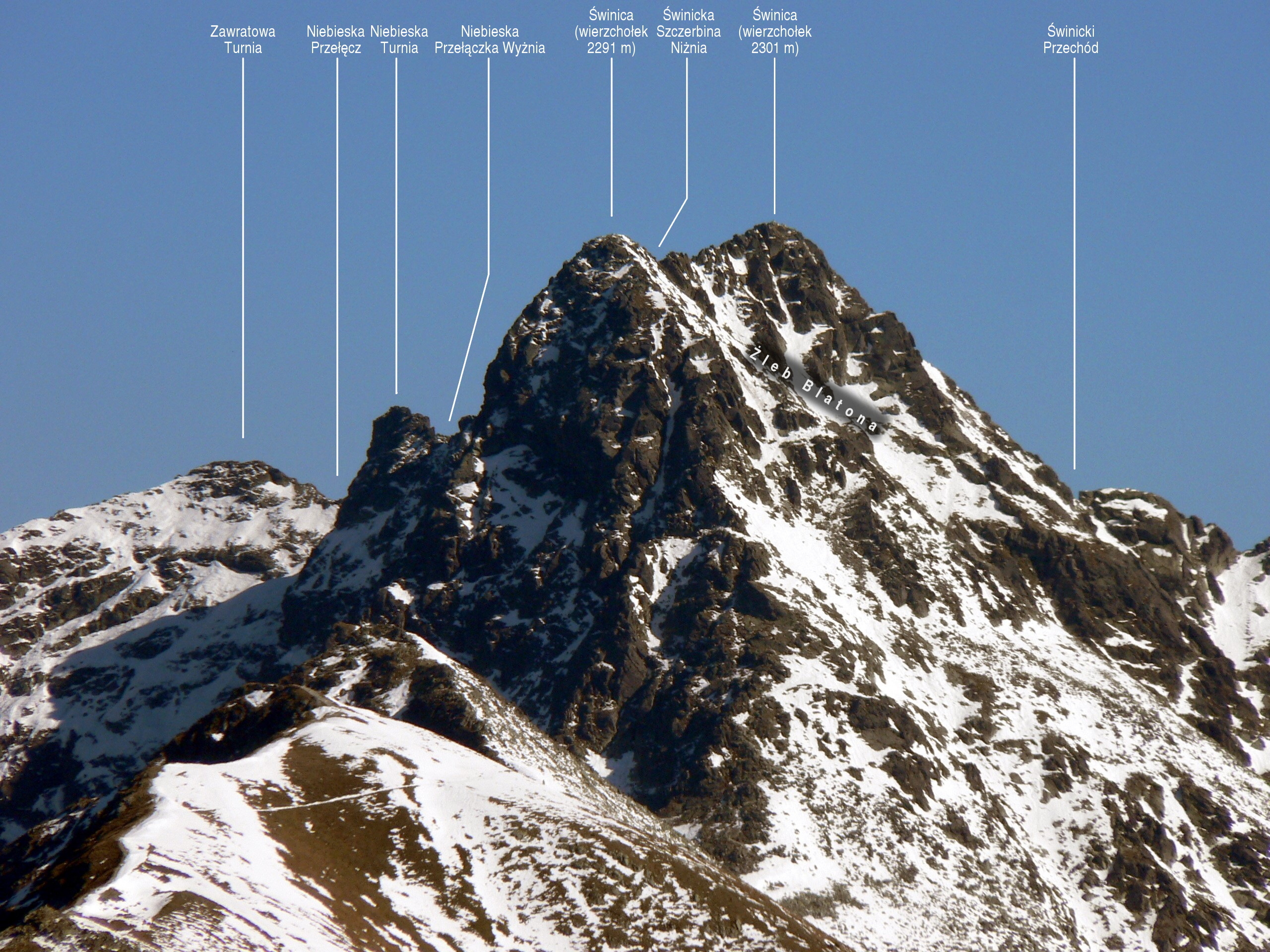 Masyw Świnicy z Przełęczy pod Kopą Kondracką